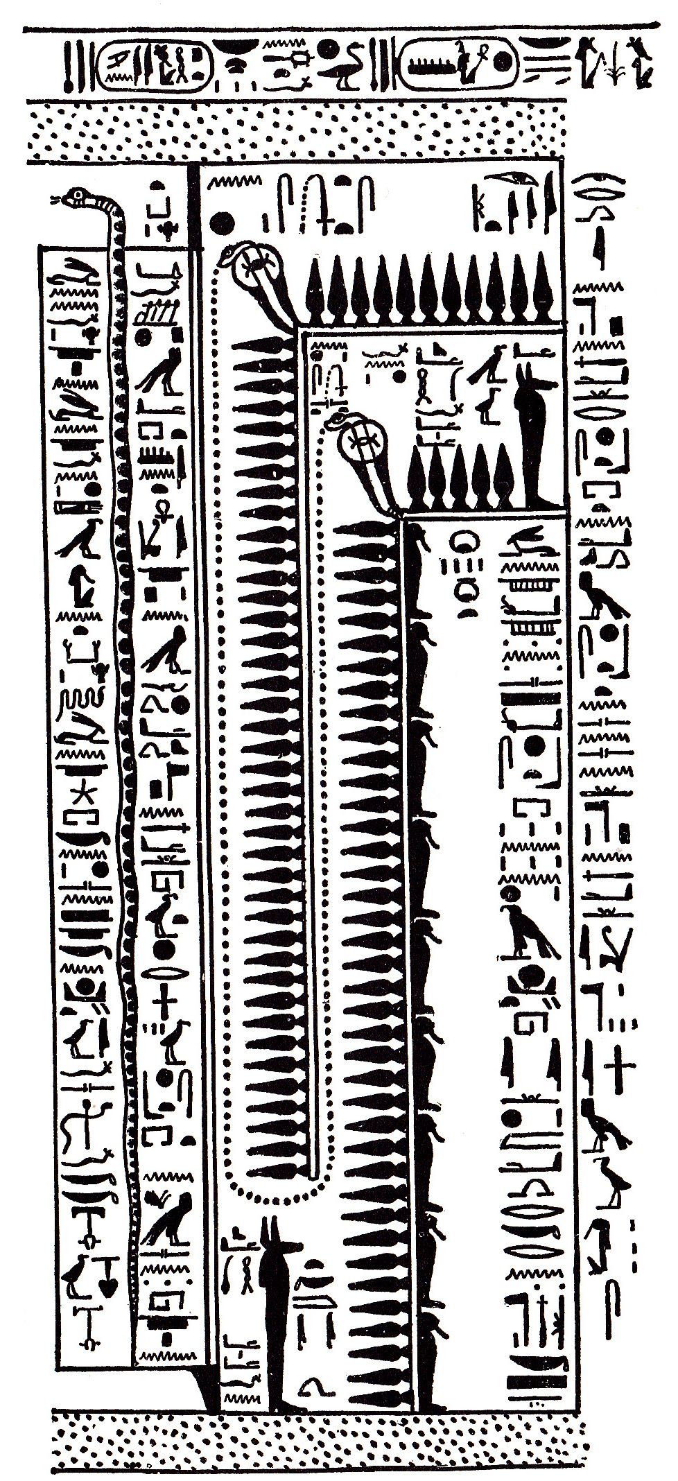 Extrait du Livre des portes